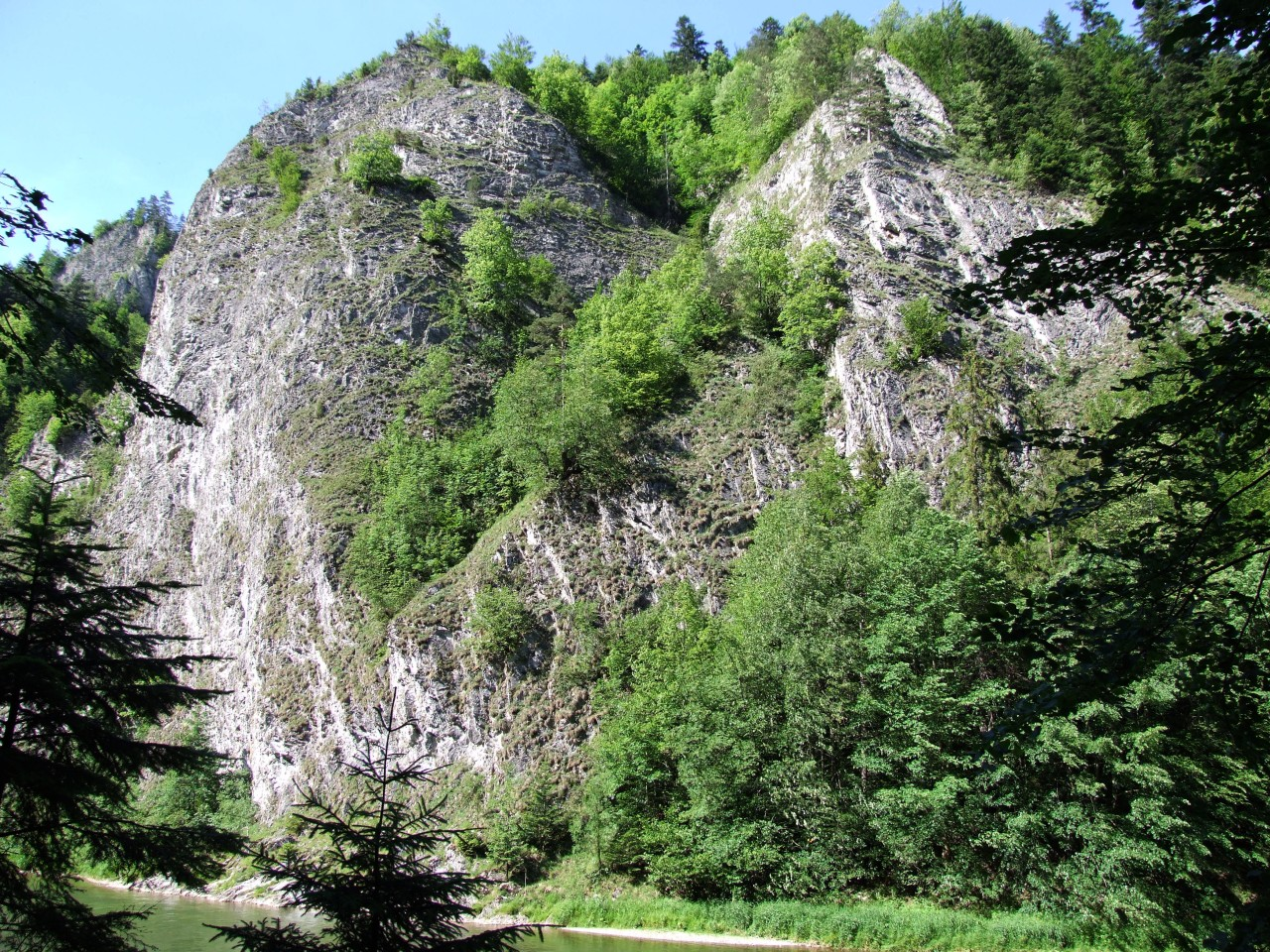 Skały Grabczychy w Pieninach. Widok z Drogi Pienińskiej